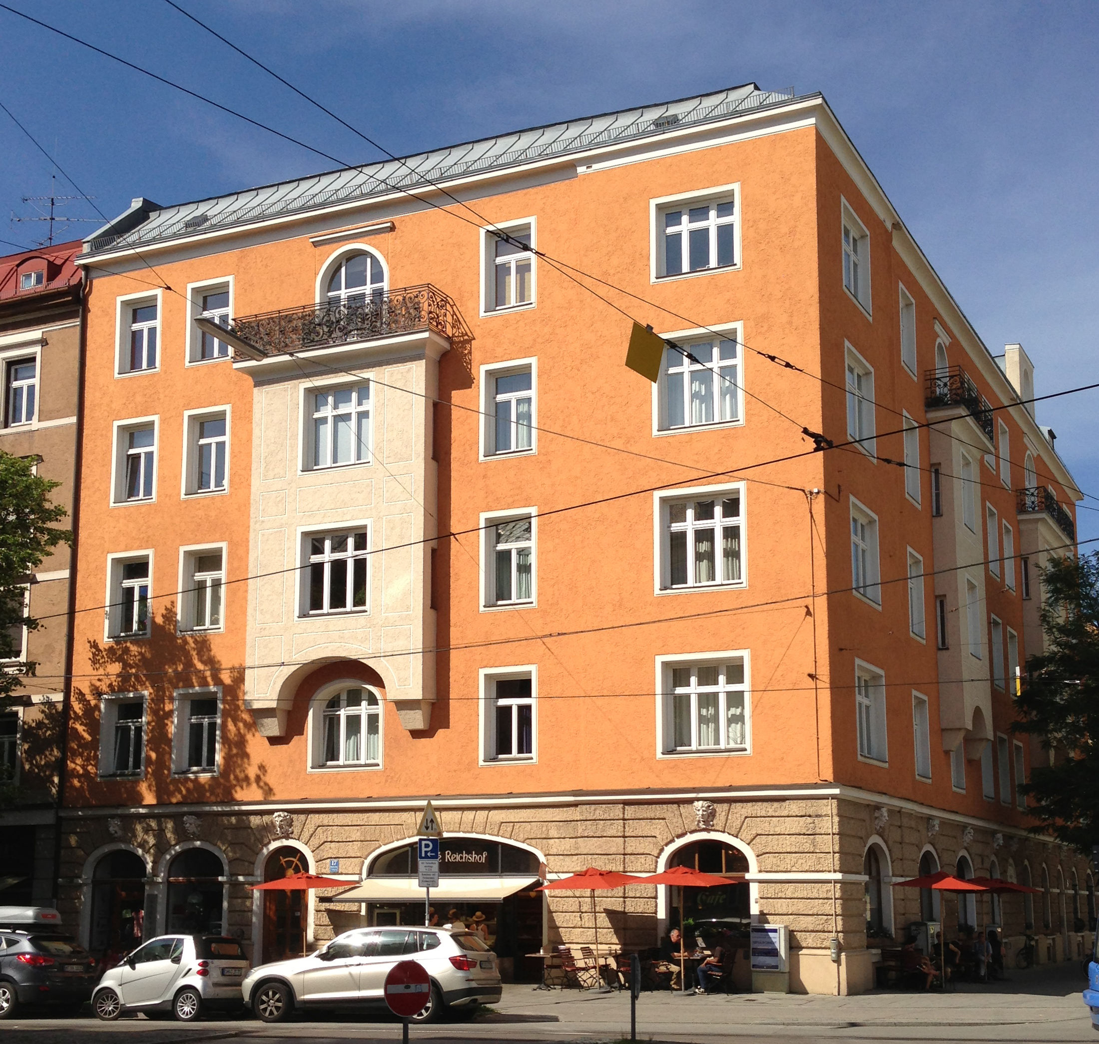 Wörthstr. 17, München